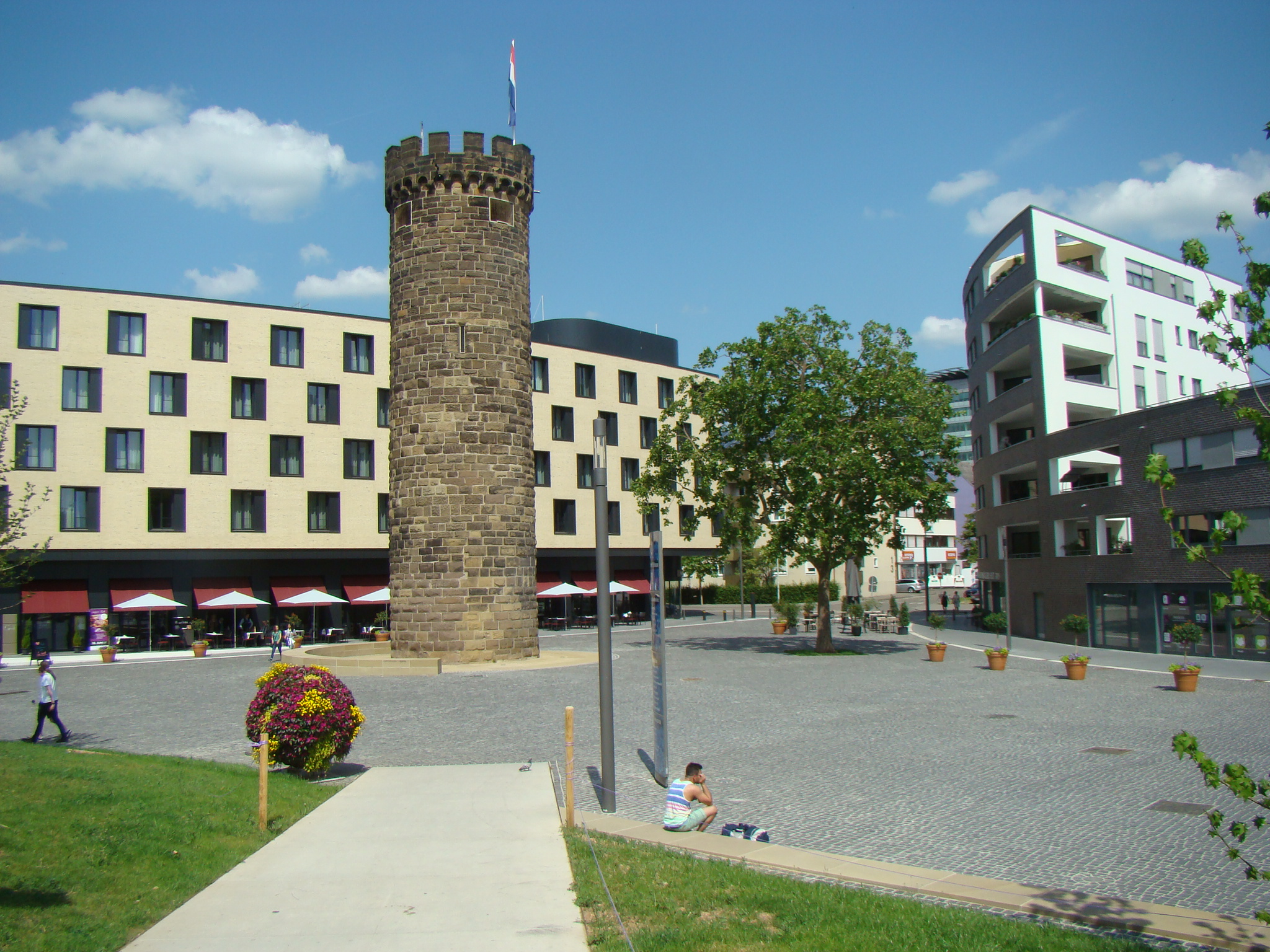 Bollwerksturm in Heilbronn